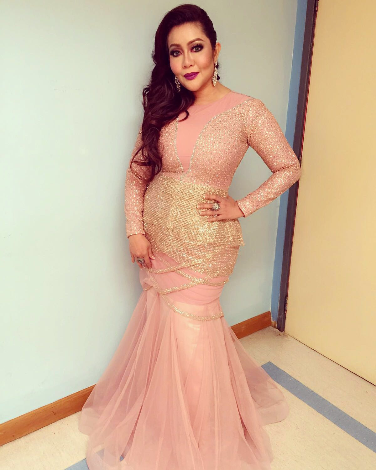 Ifa Raziah semasa Konsert Mega Gegar Vaganza 2016 di Istana Budaya